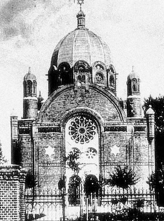 Rawicz Synagoga